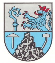 Wappen von Rammelsbach